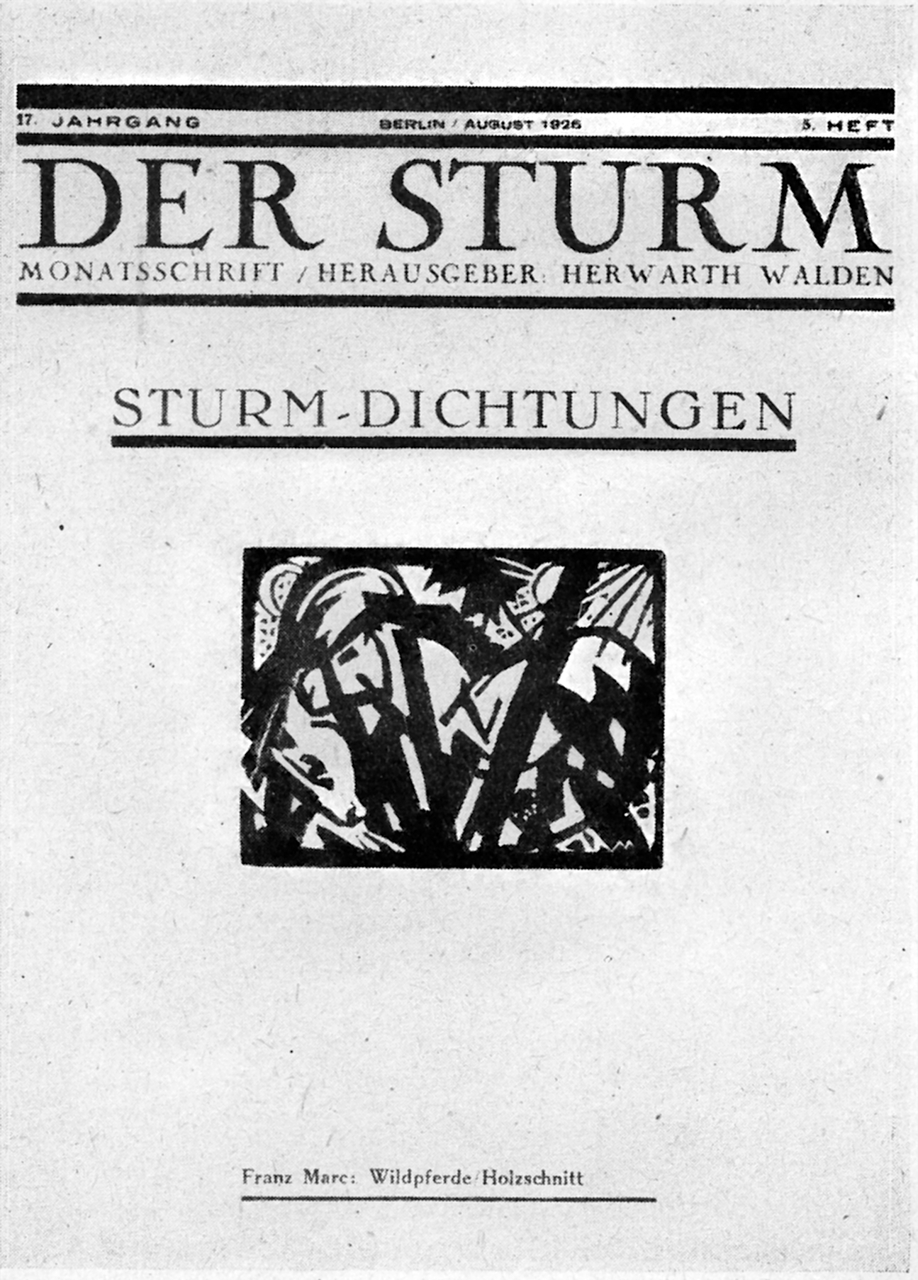 Titelblatt Monatsschrift Der Sturm.